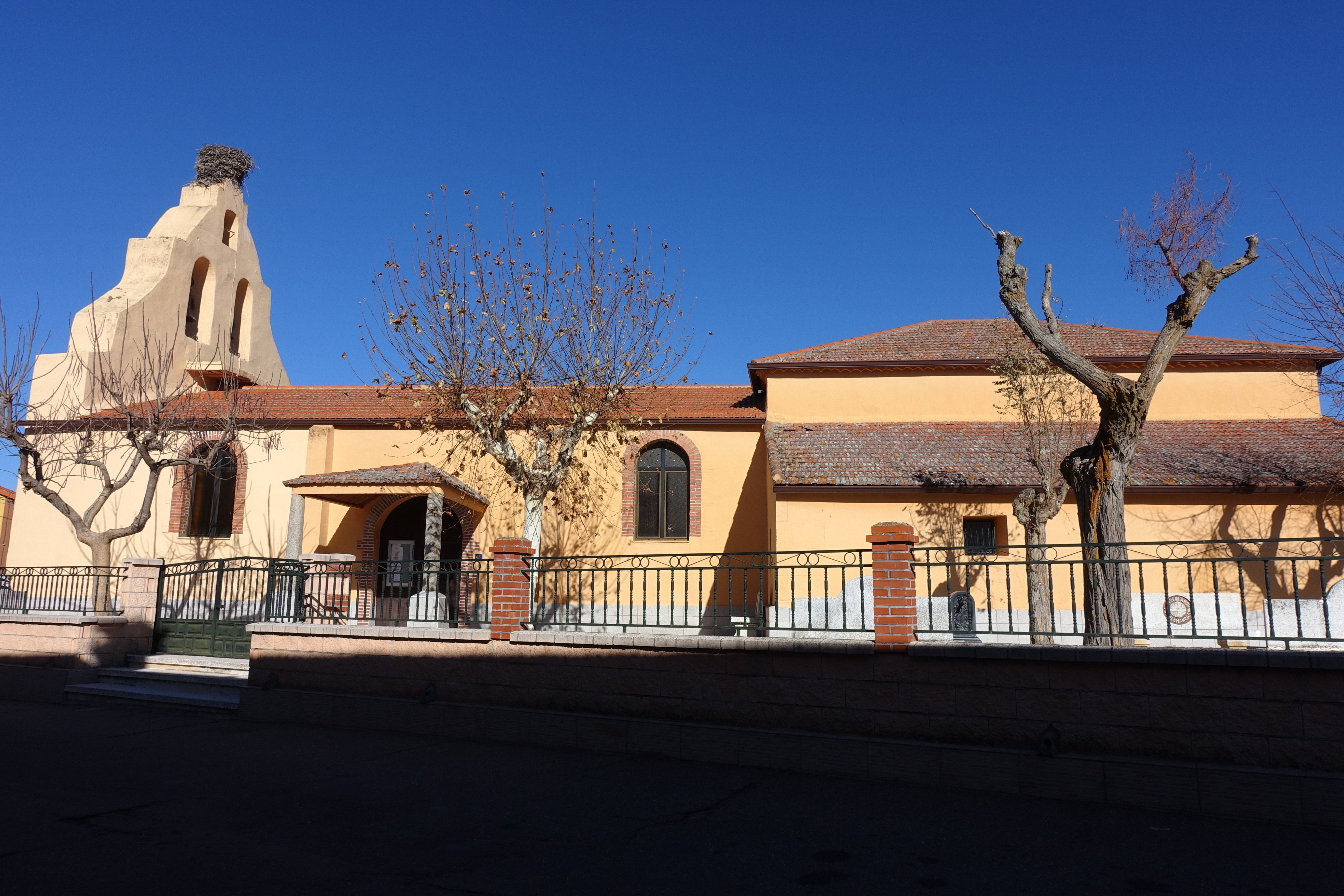 Iglesia de San Bartolomé, Morasverdes (Salamanca, España).